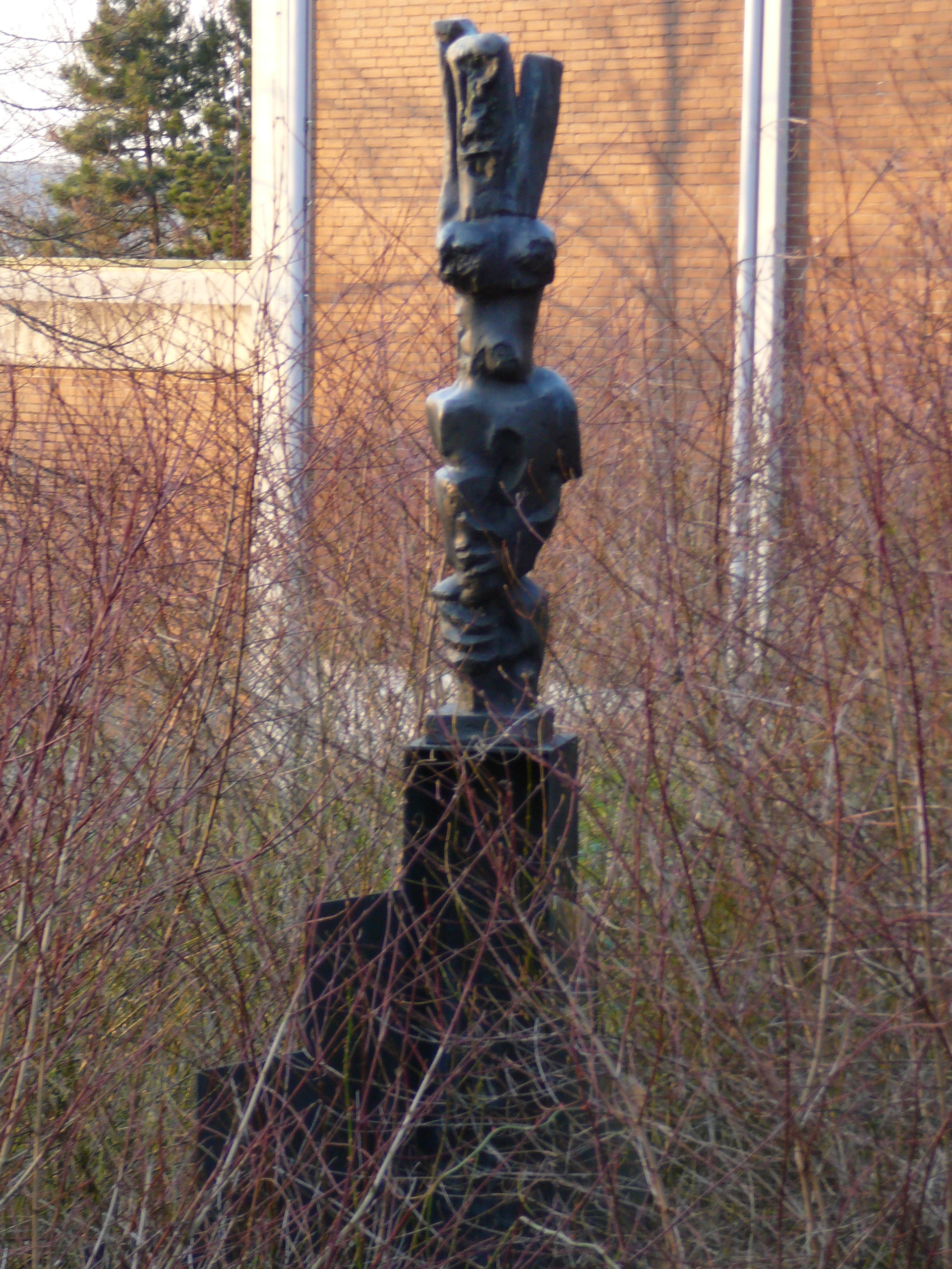 Siegespose, Schulzentrum am Kothen, Rudolf-Steiner-Straße, Wuppertal